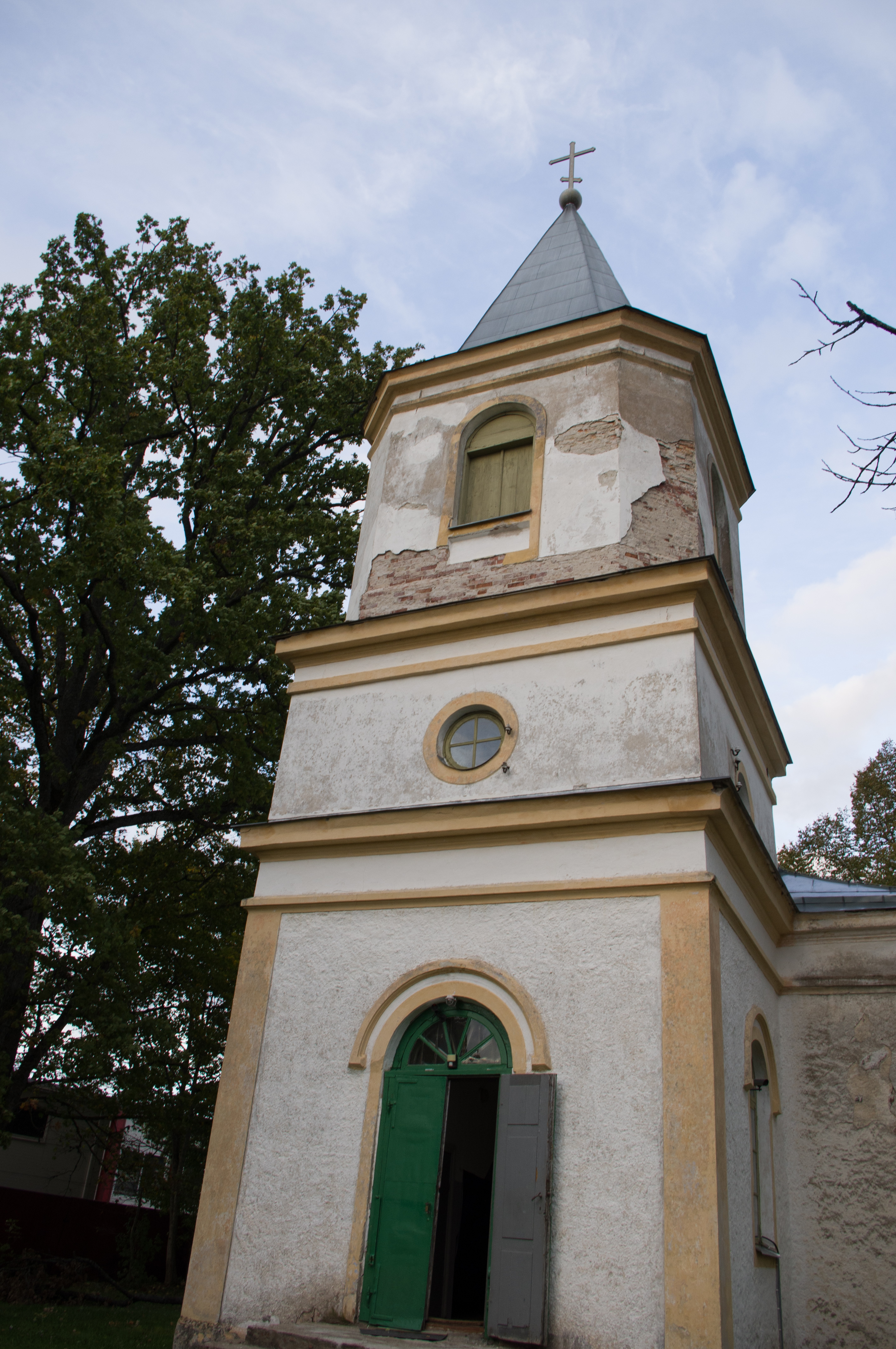 Karksi-Nuia õigeusu kirik, 1876.a.